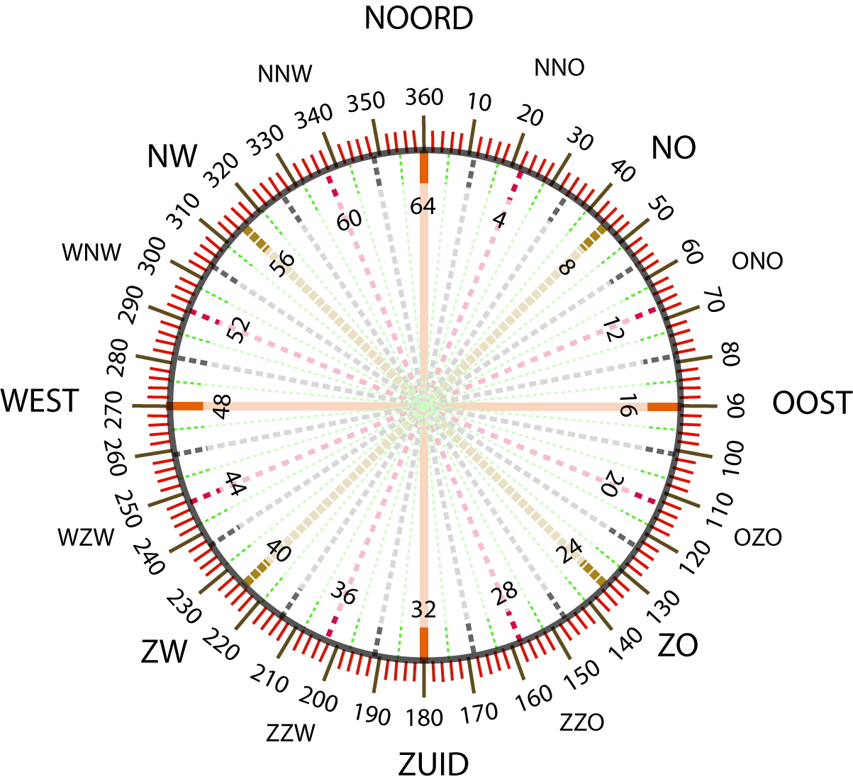 Kompasroos, streken, verdeling in graden en in duizendsten. 360 graden = 6400 duizendsten. Eigen werk Ed Stevenhagen 25 jul 2005 16:59 (CEST) Vrij te gebruiken